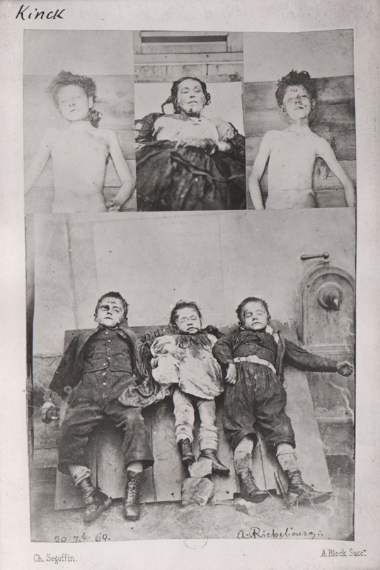 Six membres de la famille Kinck, victimes de Jean-Baptiste Troppmann, auteur du « massacre de Pantin ». En haut, de gauche à droite : Émile (16 ans), Mme Kinck (40 ans), Henri (14 ans) ; en bas, de gauche à droite : Achille (6 ans), Marie (3 ans) et Alfred (8 ans).